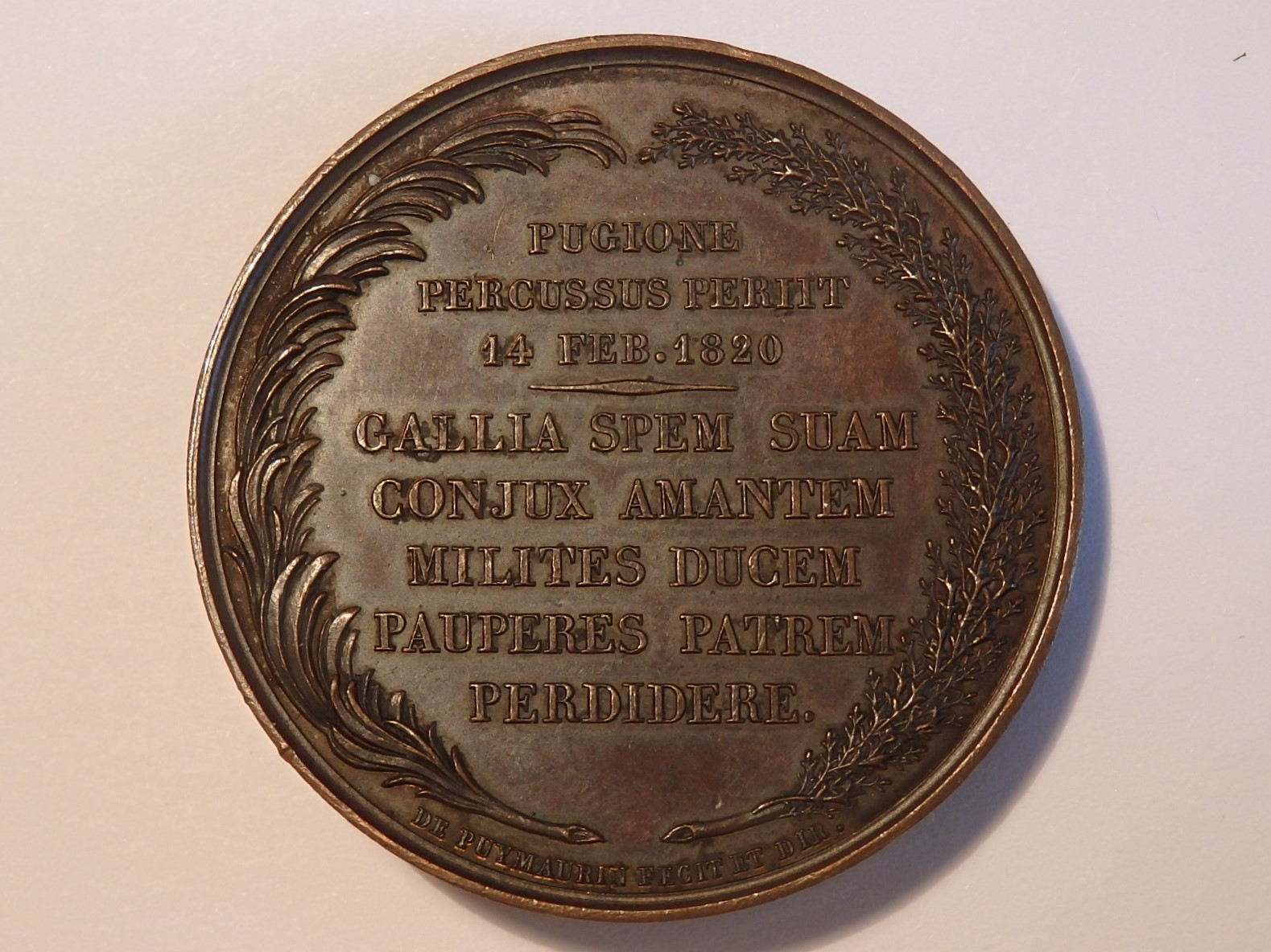 Rückseite der Medaille von 1820